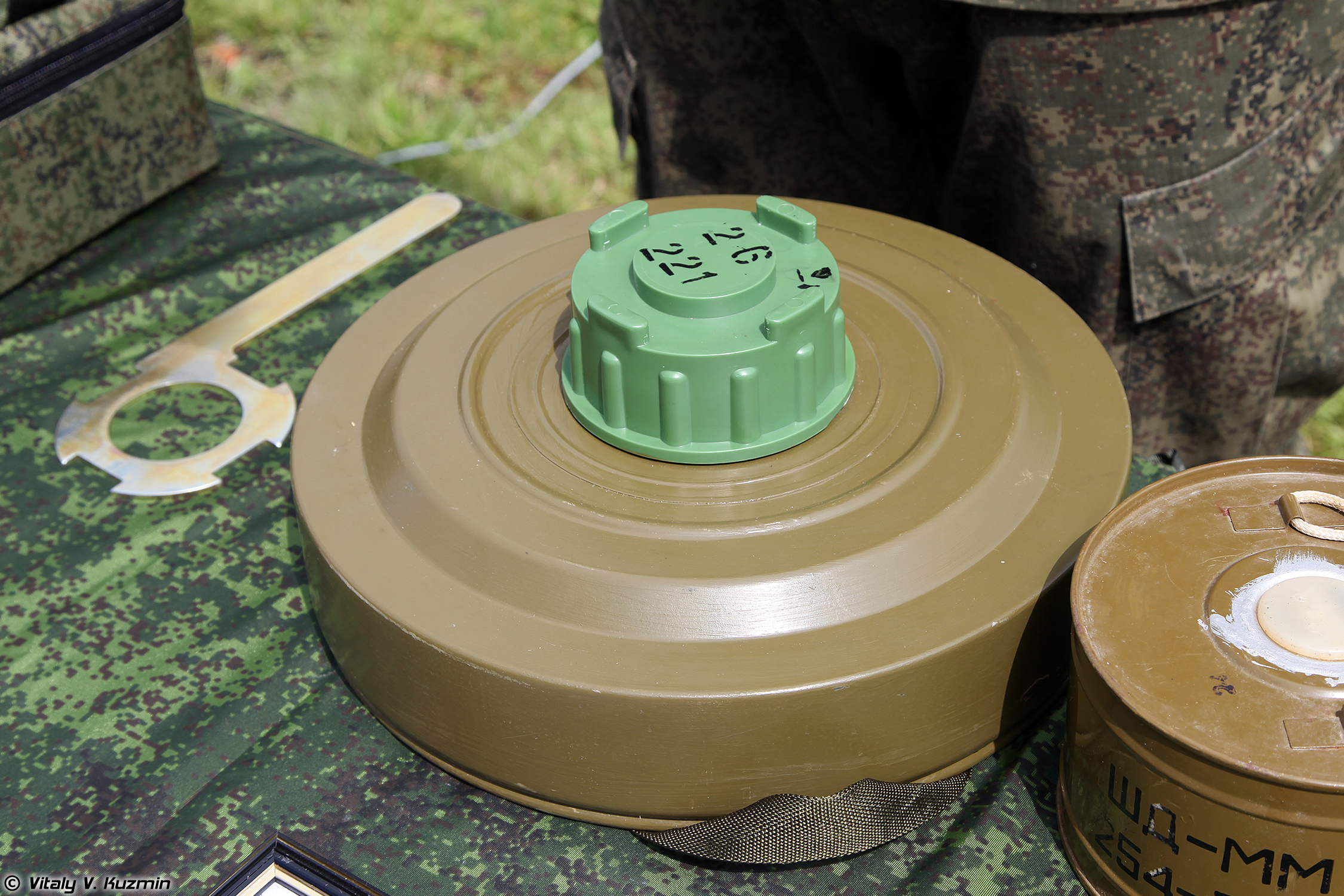 Унифицированная дымовая шашка УДШ (UDSh smoke mine)